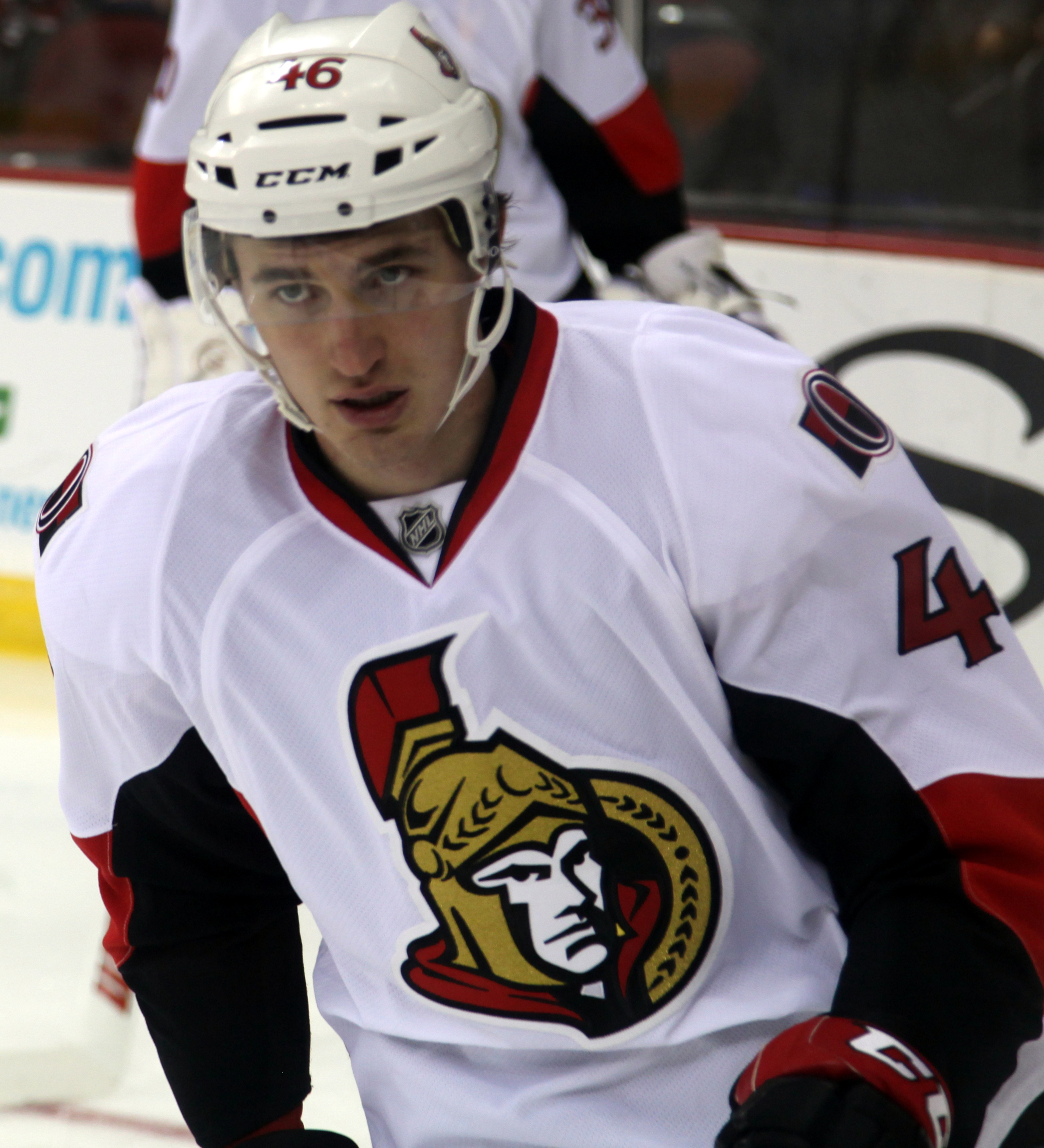 Patrick Wiercioch in 2013.